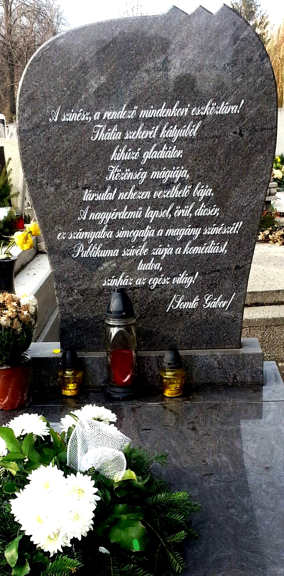 Miskolci Mindszenti temető.